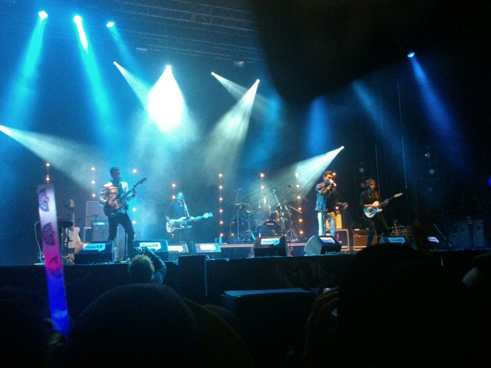 Fotografia de miss caffeina en el SOS